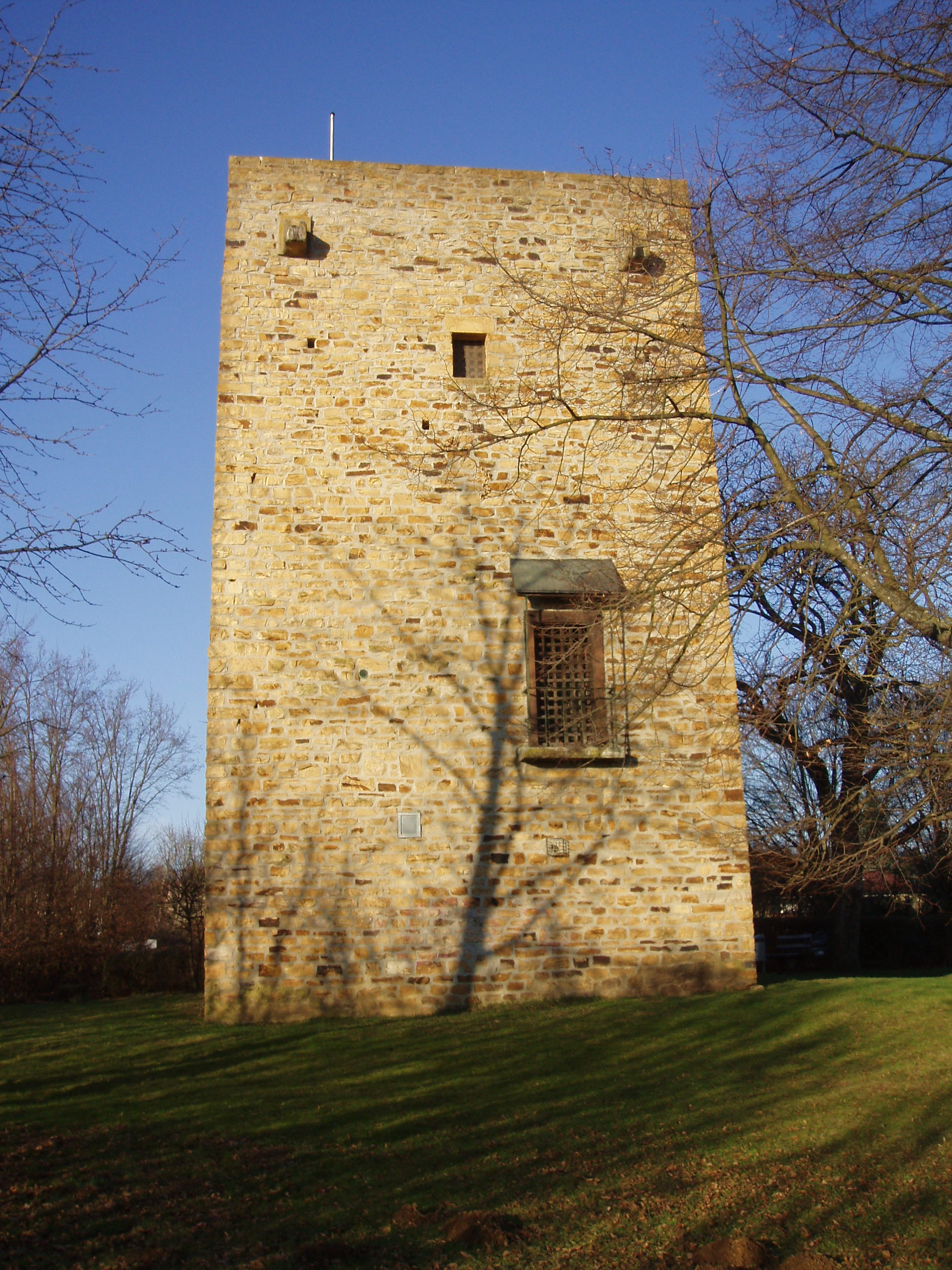 Jubiläumsturm